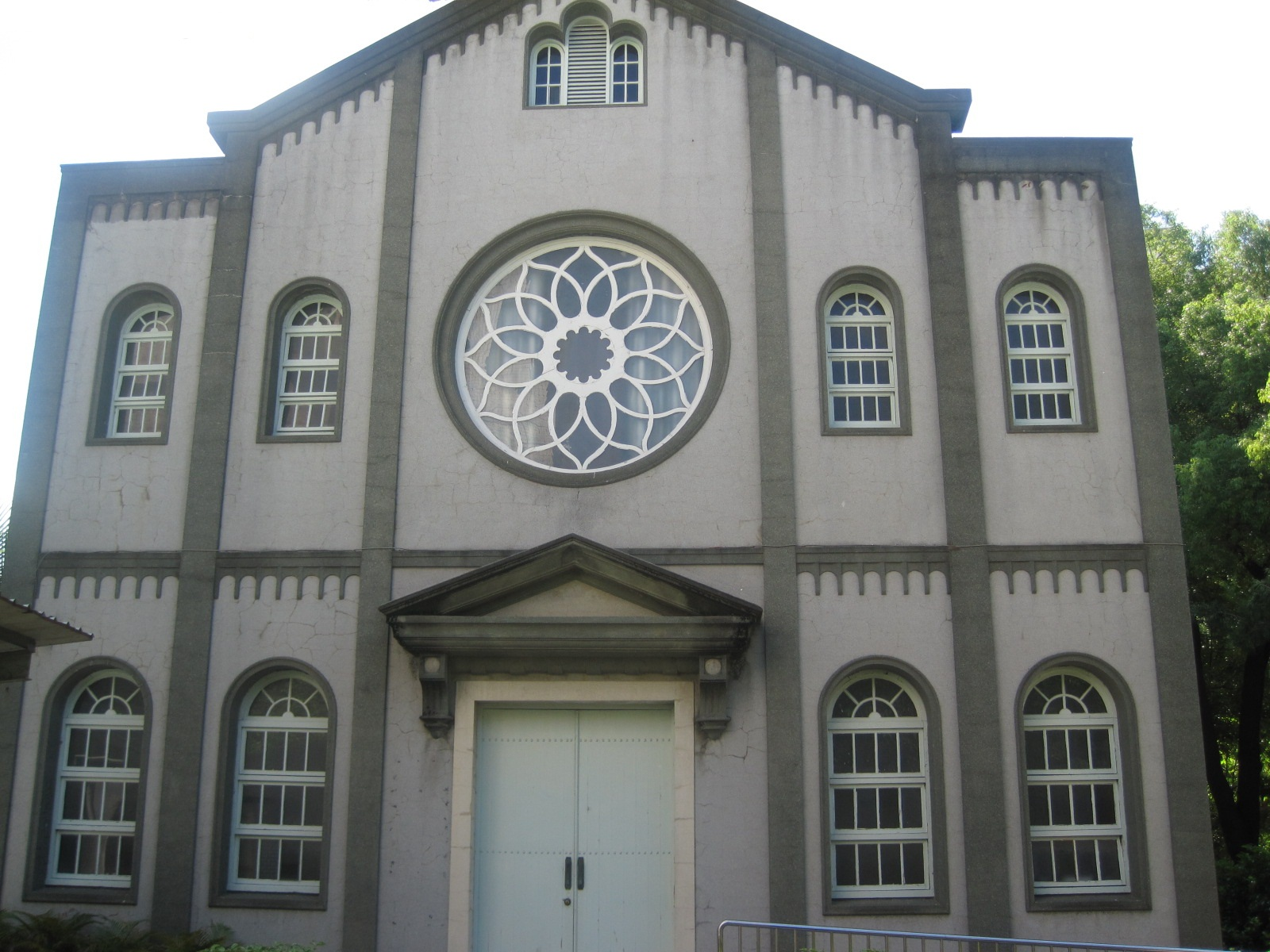 台南神學院禮拜堂主入口